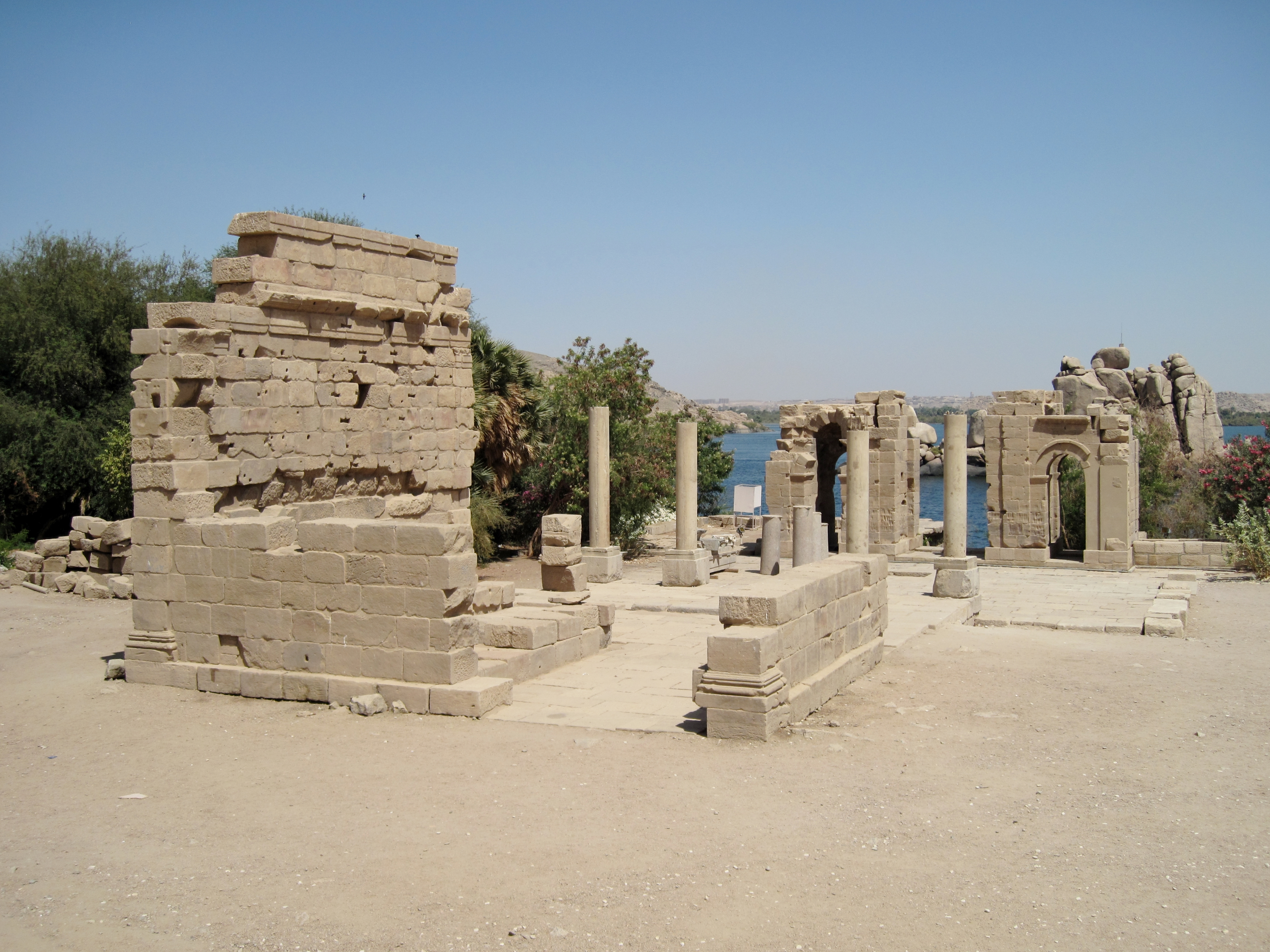 Tempel des Augustus auf der Insel Agilkia, ehemals auf der Insel Philae, Ägypten